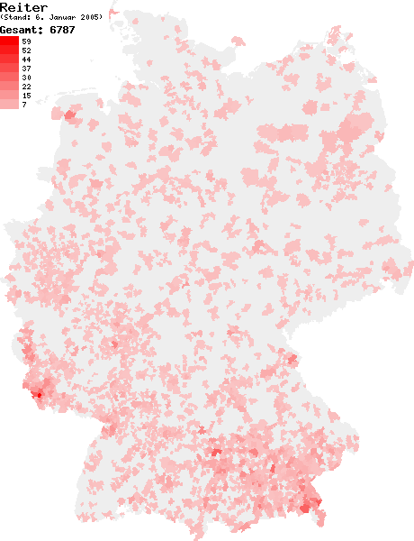 Verteilung des Nachnamens Reiter in Deutschland nach dem Telefonbuch mit Stand vom 6. Januar 2005